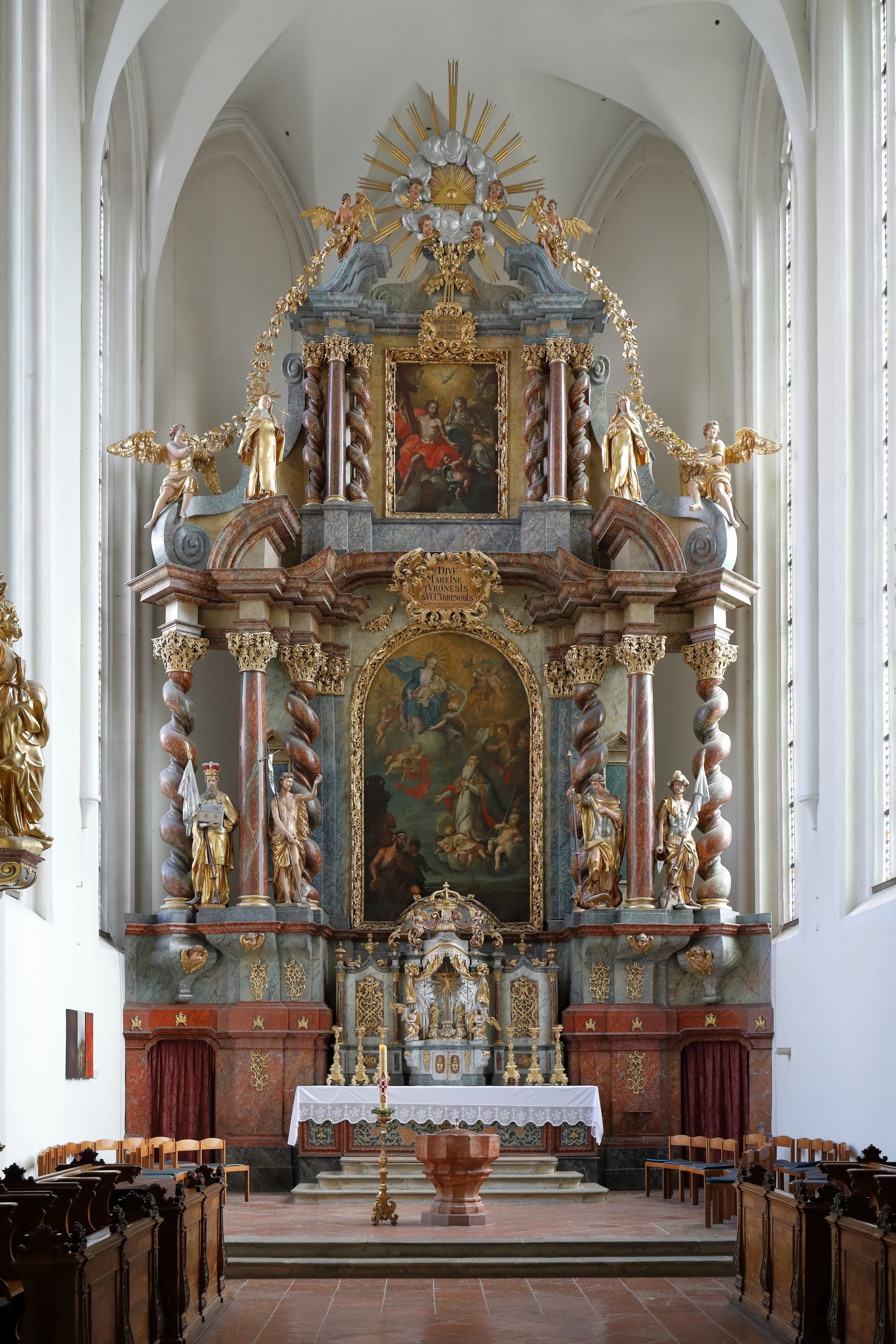 Hochaltar der Martinskirche in der niederösterreichischen Stadt Klosterneuburg.